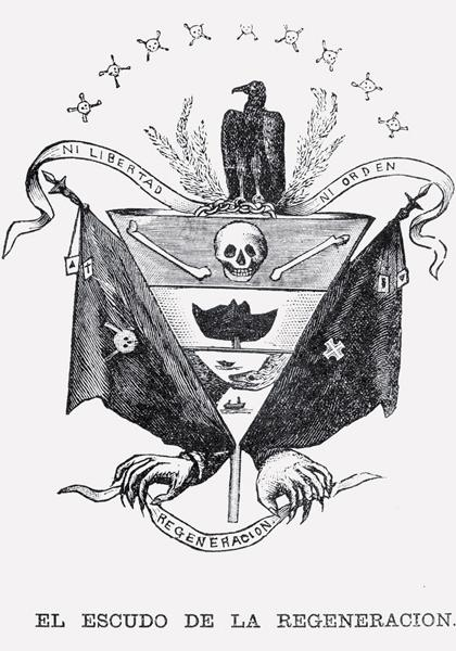 Caricature représentant la Regeneración sous forme de blason.